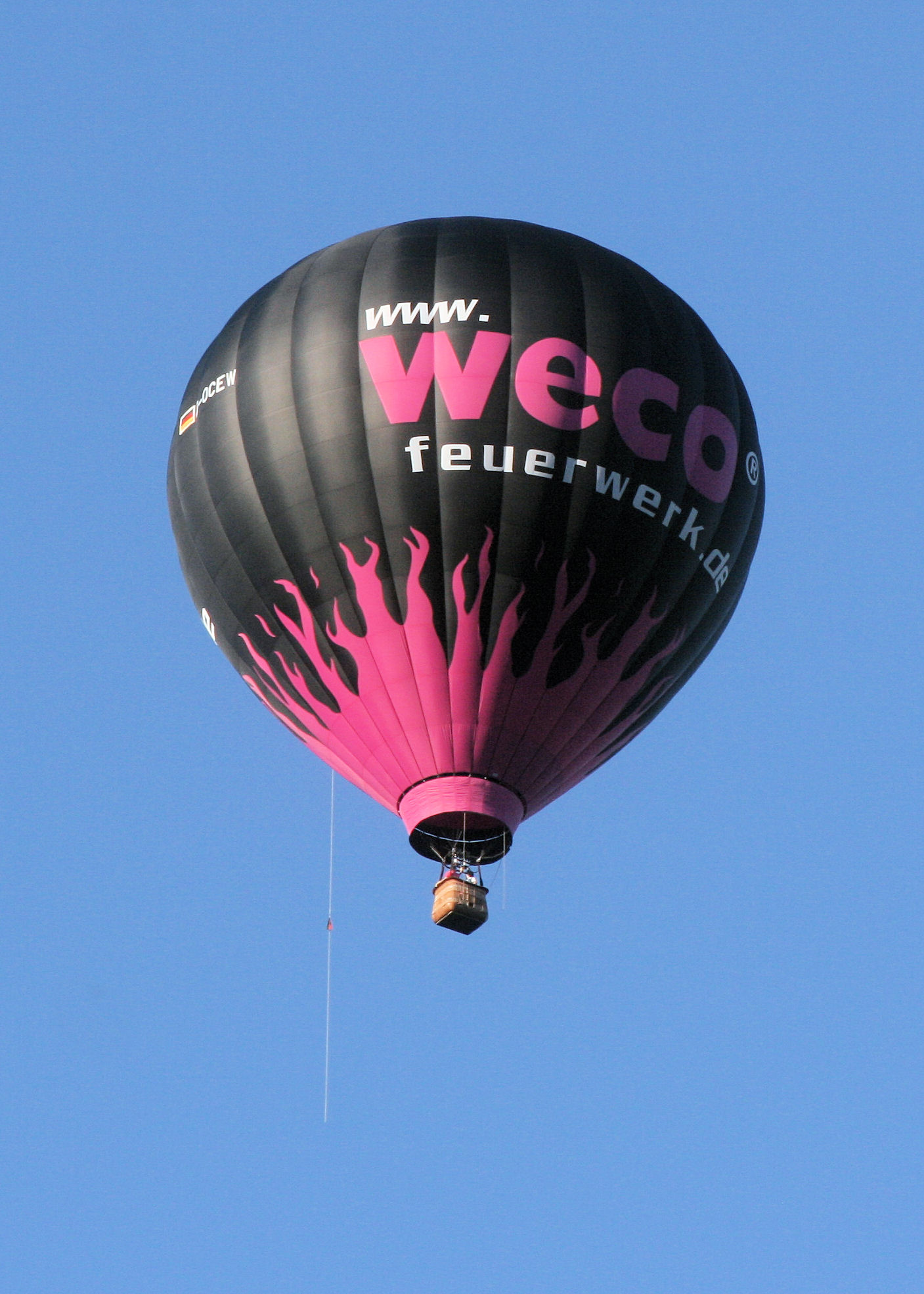 Heißluftballon Weco